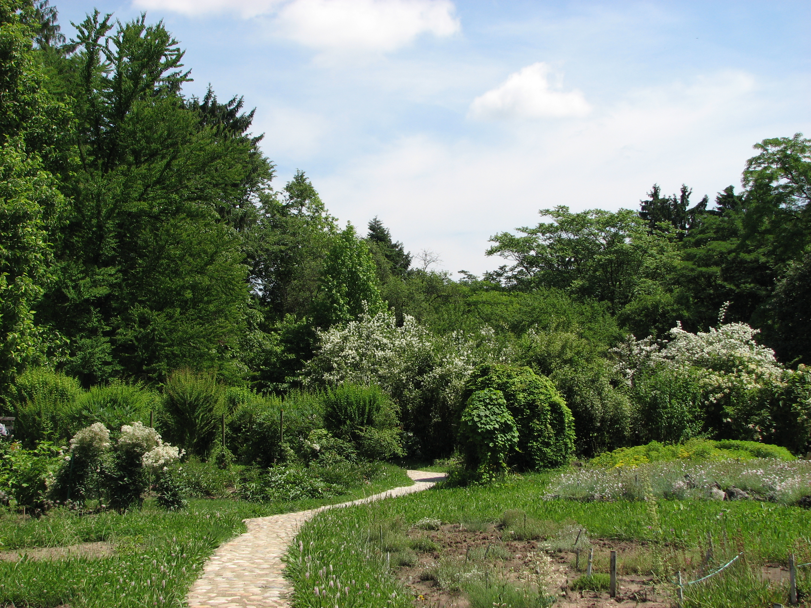 Botanisk have Cluj-Napocas.